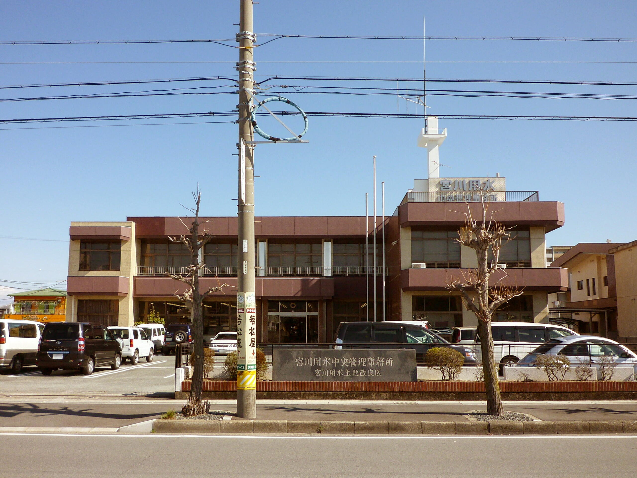 宮川用水中央管理事務所